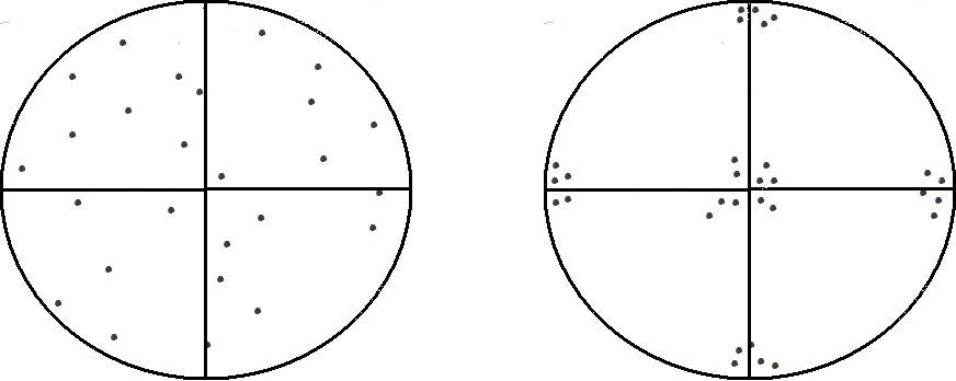 Deze afbeelding heb ik zelf gemaakt in "paint". Wel heb ik me daarbij laten inspireren door een plaatje uit "Elements of X-ray diffraction" van B.D. Cullity, derde druk 1967, pagina 275.